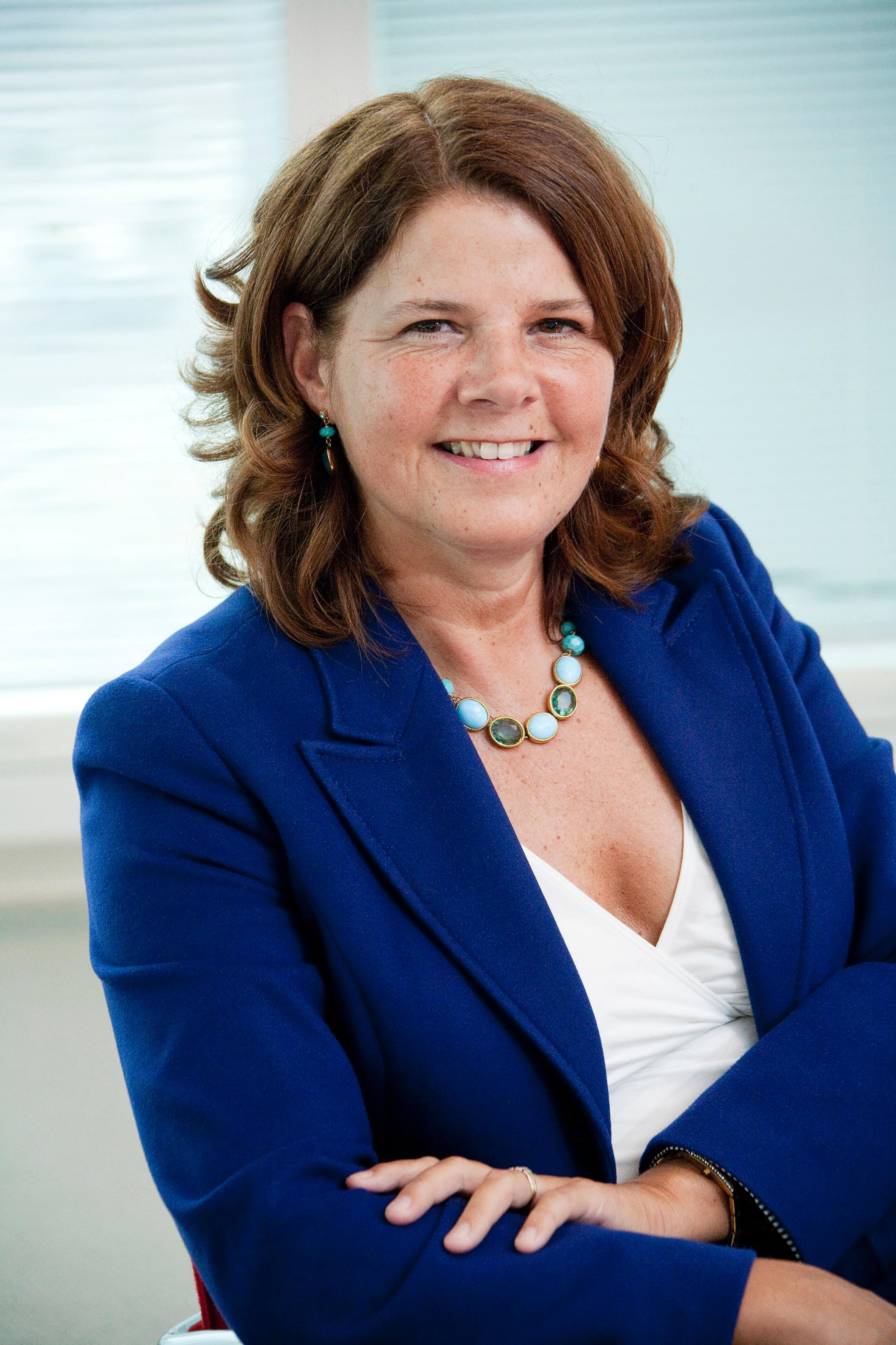 Minister van Onderwijs Marja van Bijsterveldt